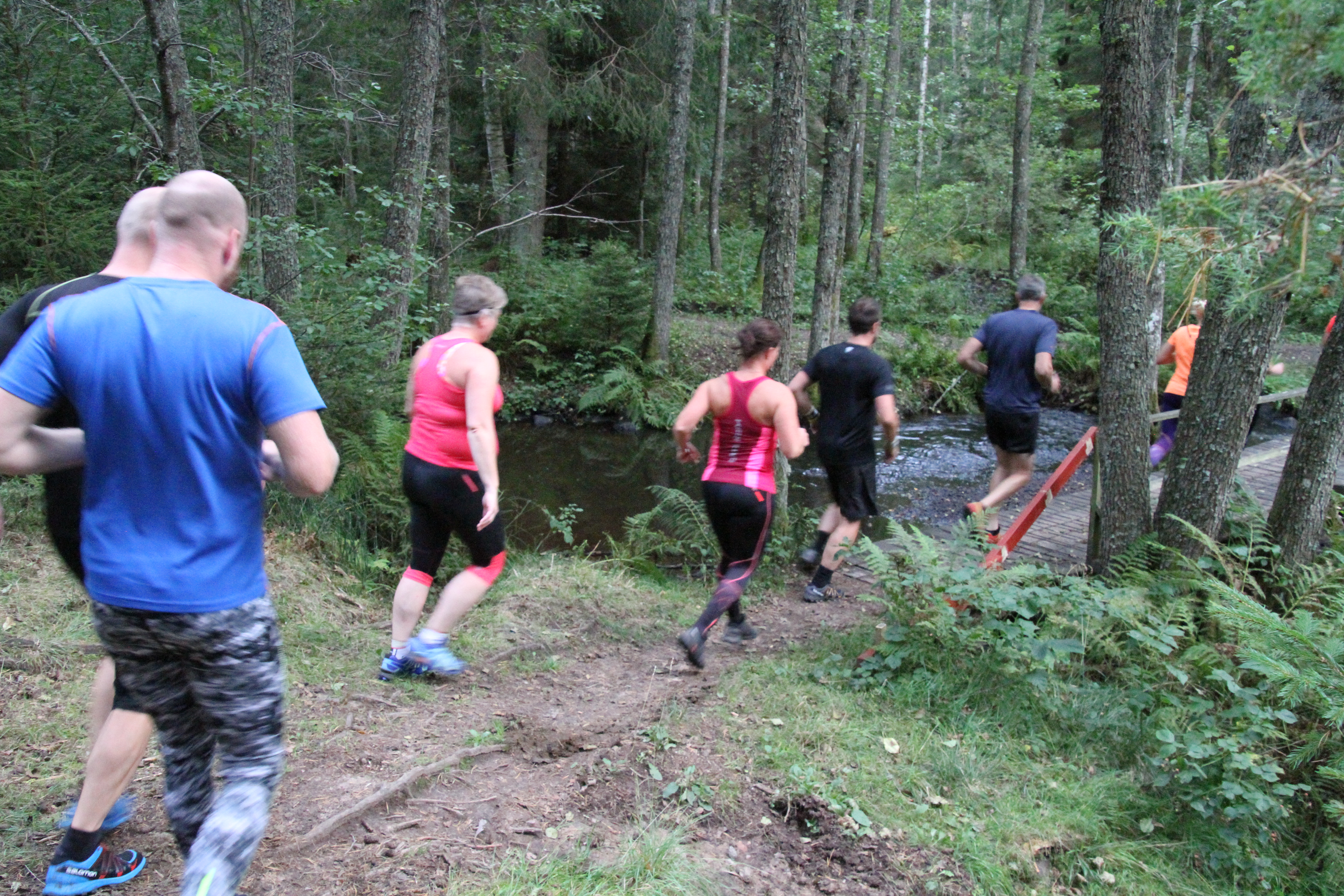 Träningsgrupp i Rankås 2016